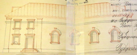 Выгляд па боку аб Лідскай сінагогі 1893 года